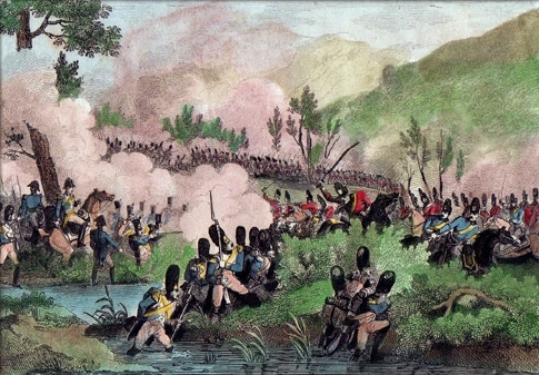 Bataille de Caldiero, 30 octobre 1805.